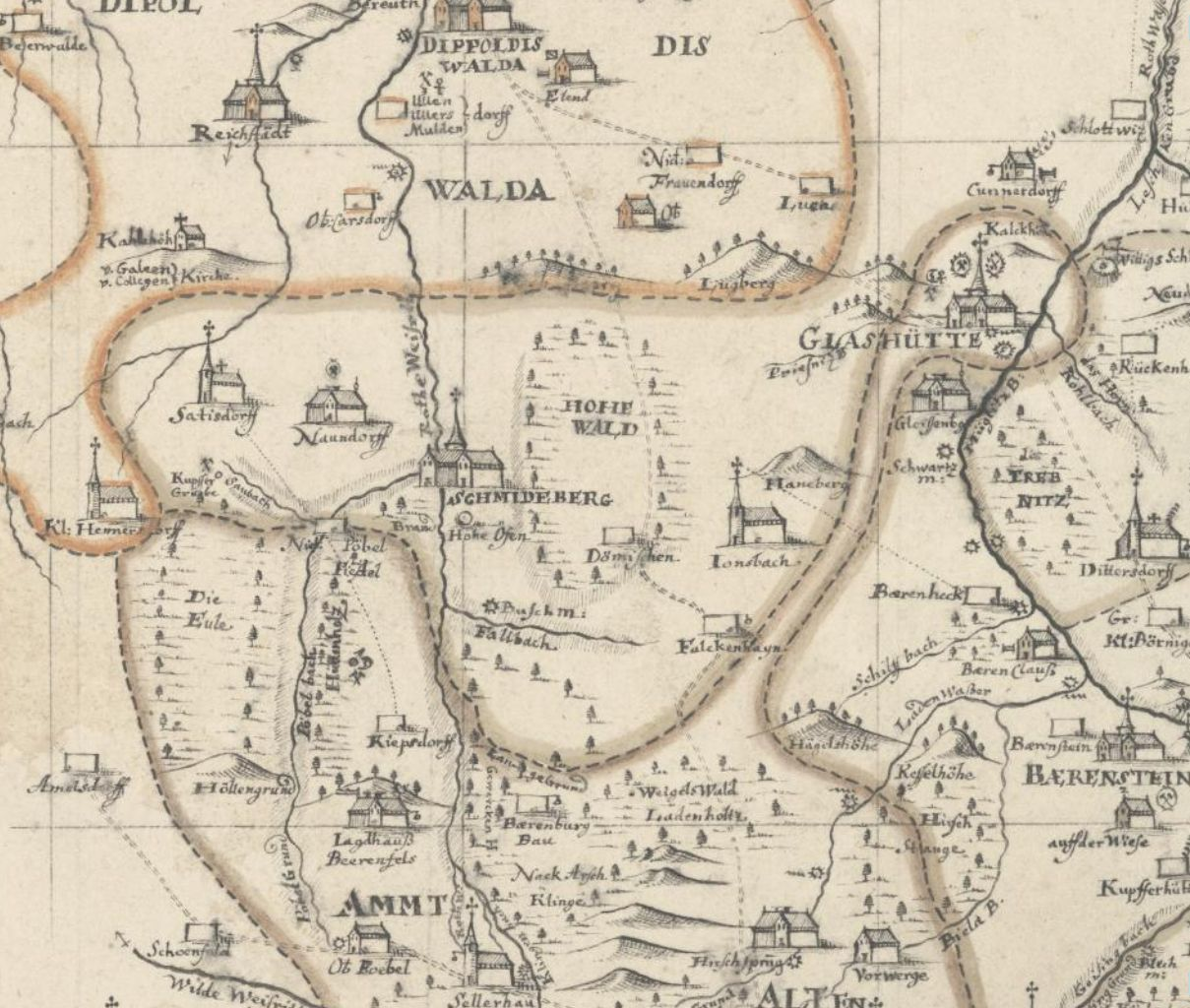 Hohenwalde (Wüstung): Hohe Wald in der Landkarte ChurF. S. Land- und Grentz-Commiss. auch Geographus, des Churfürstenthums Sachsen Meisnischer Creis Geographice - Mscr.Dresd.J.20.d : delineiret und aus denen über jeglich Amt gefertigten Special-Charten copirt und zusammen in diese General-Creis-Charte geb[r]acht, Handzeichnung von 1733, von Adam Friedrich Zürner (Link zur Karte in der Sächsischen Staats- und Universitätsbibliothek)